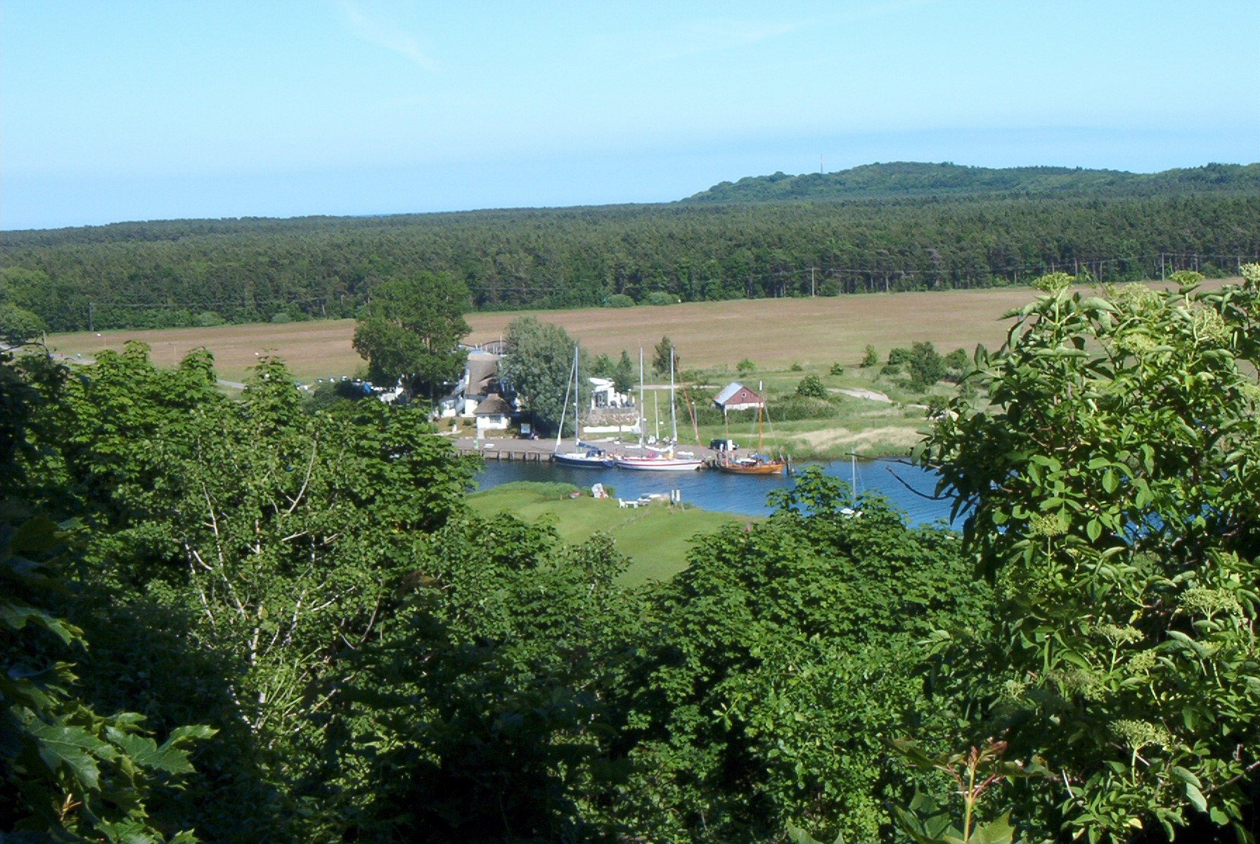 Blick von der Moritzburg in Moritzdorf, Bild aufgenommen am 18.6.2005 durch Olaf Meister